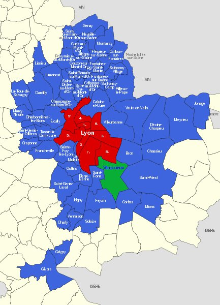 Communes du Grand Lyon, en vert Venissieux